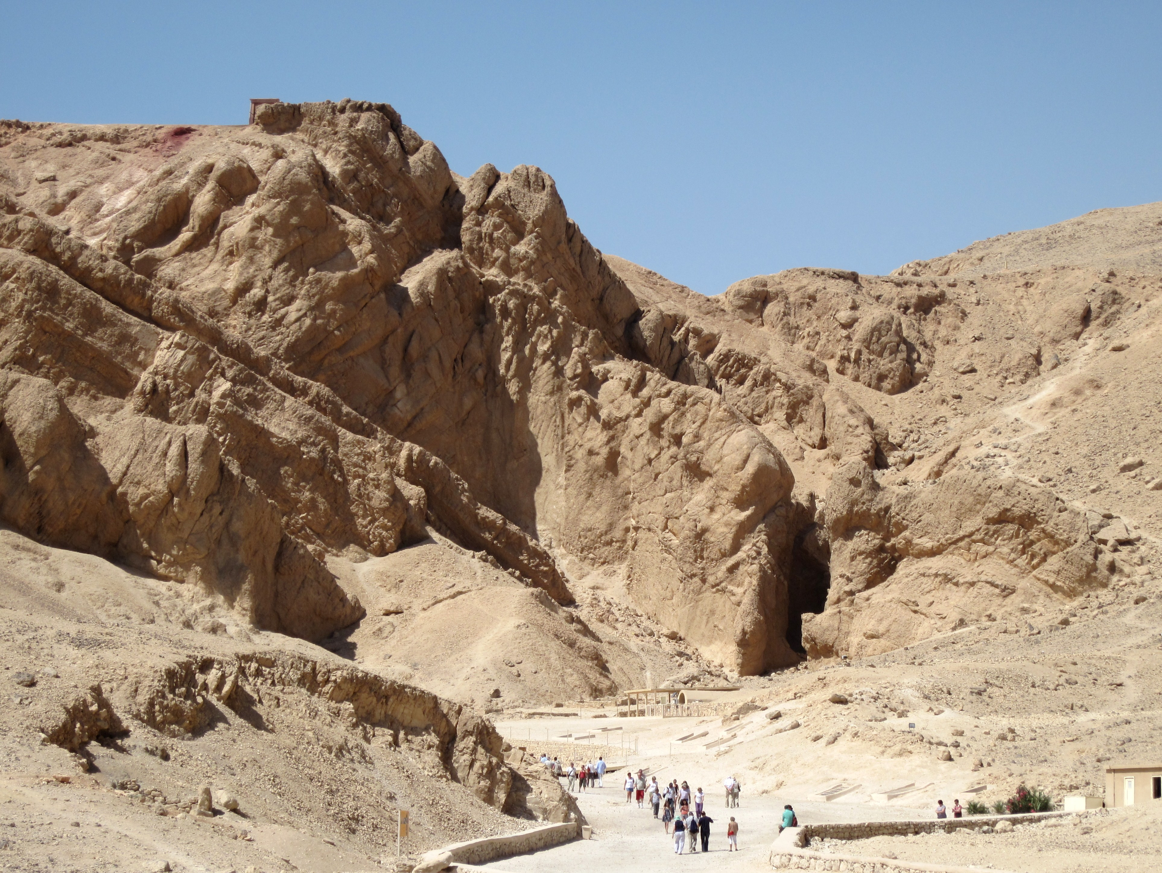 Blick in das Tal der Königinnen, Theben-West (Luxor), Ägypten